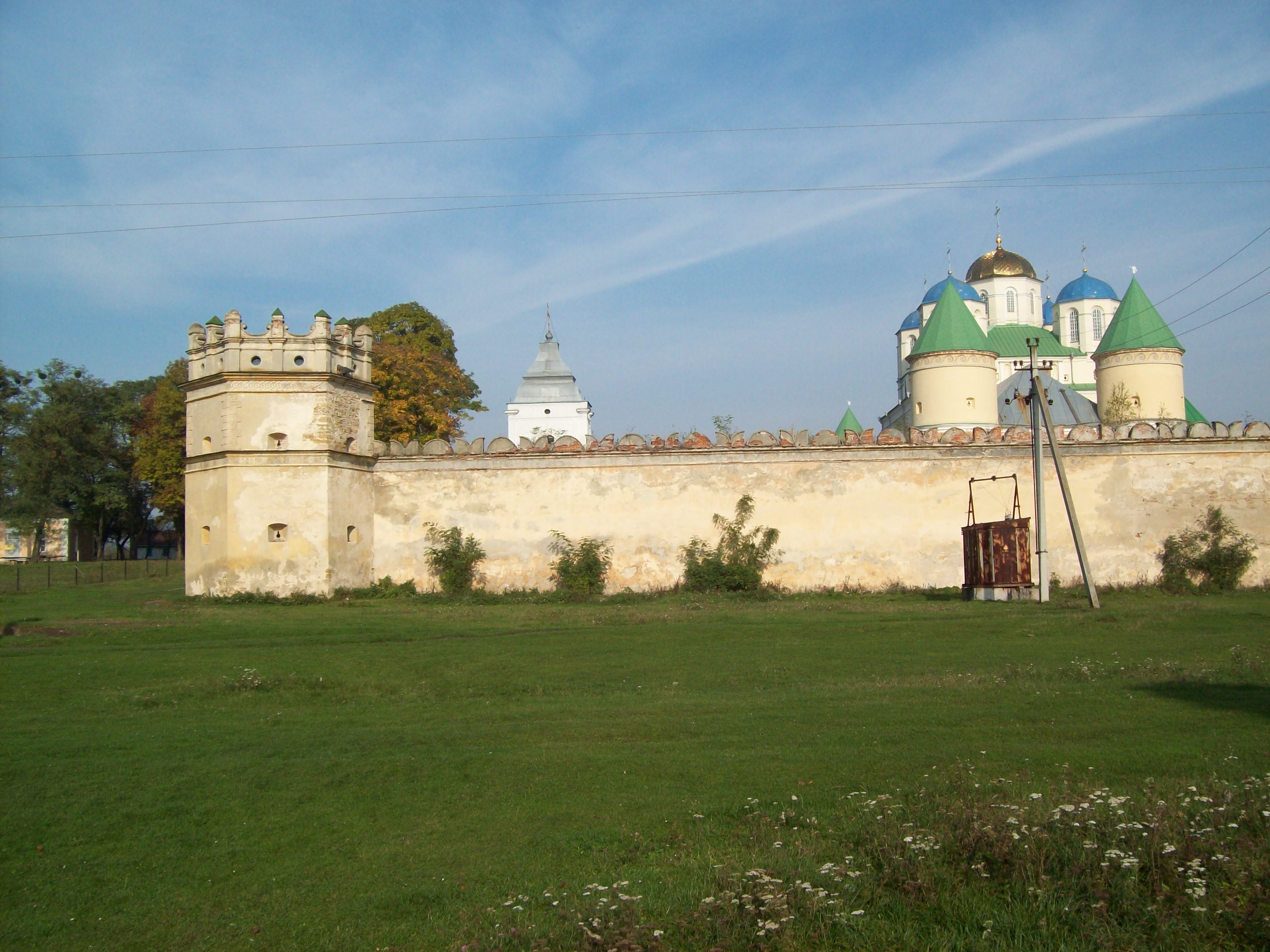 Знято фотоапаратом Кодак